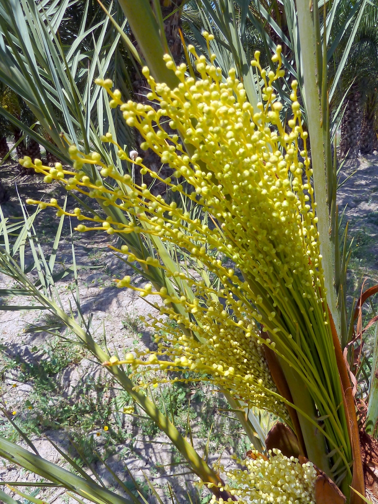 Phoenix dactylifera (Palmera datilera) : Inflorescencias hembras emergiendo de sus espatas - La Huerta, Albatera (Alicante, España).